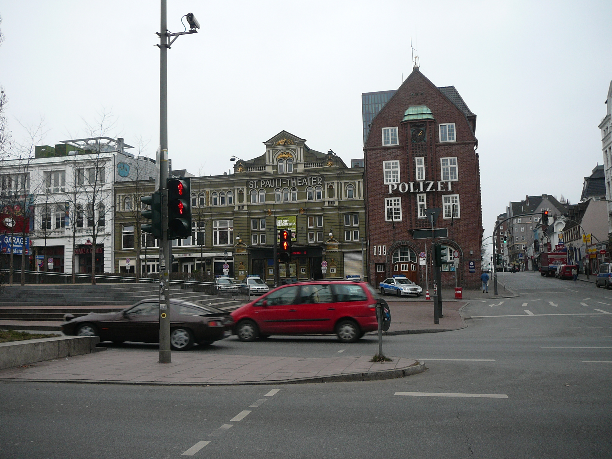 Hamburg, St Pauli